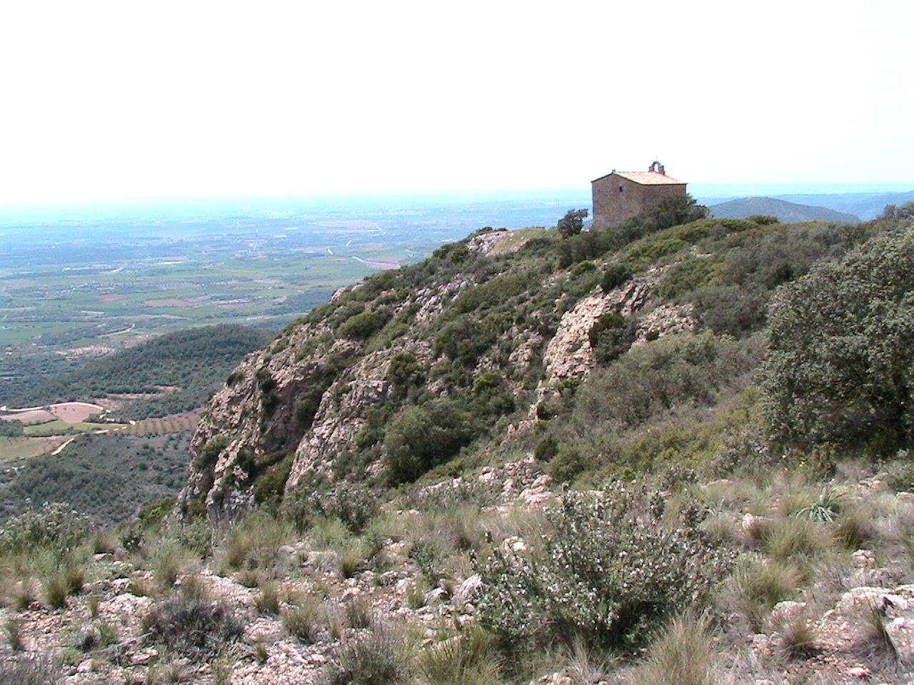 El Puig de Sant Jordi amb l'ermita al cim. A la Serra Carbonera de Camarasa (Noguera - Catalunya)